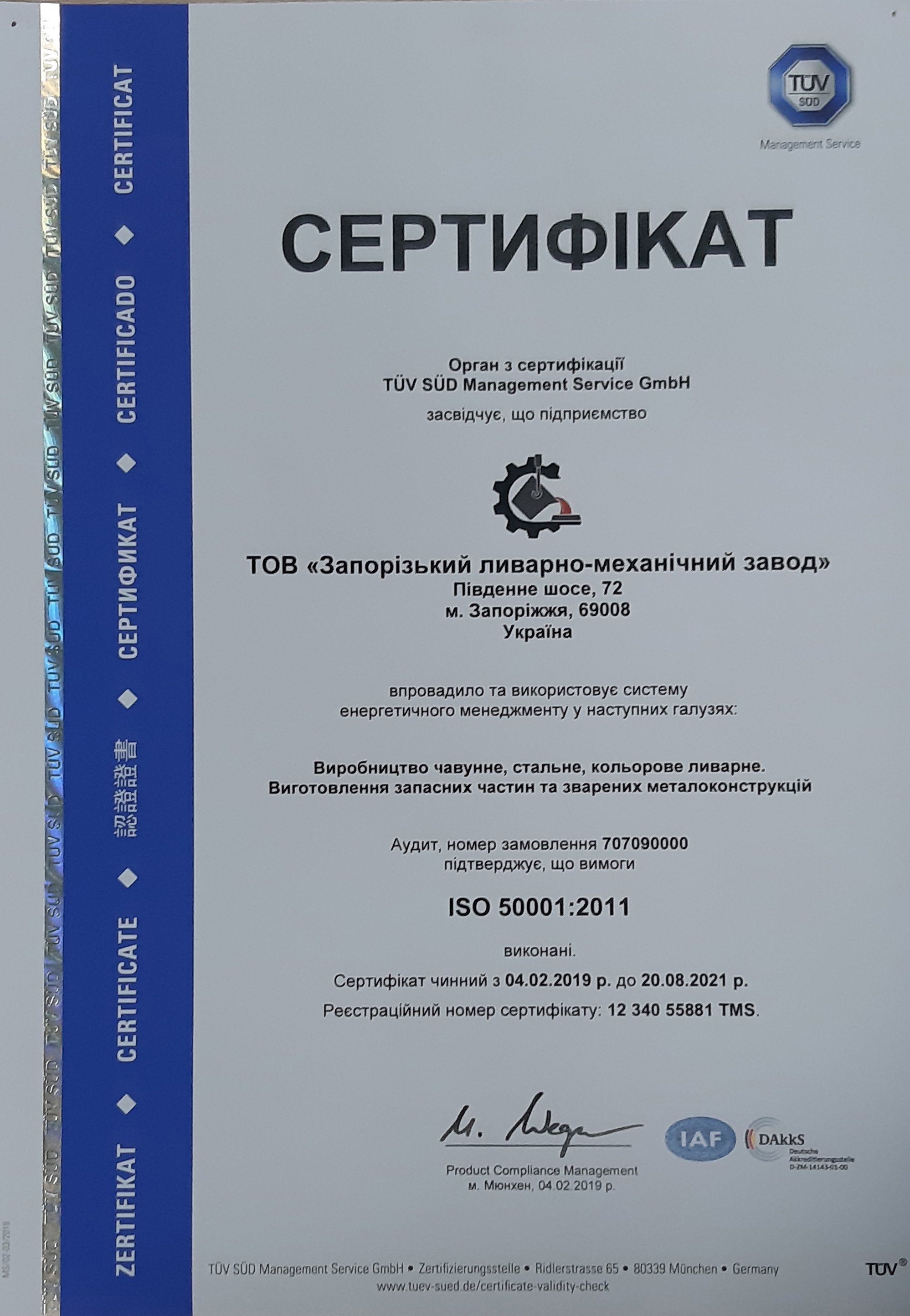 Сертификат соответствия энергетическому стандарту ISO50001